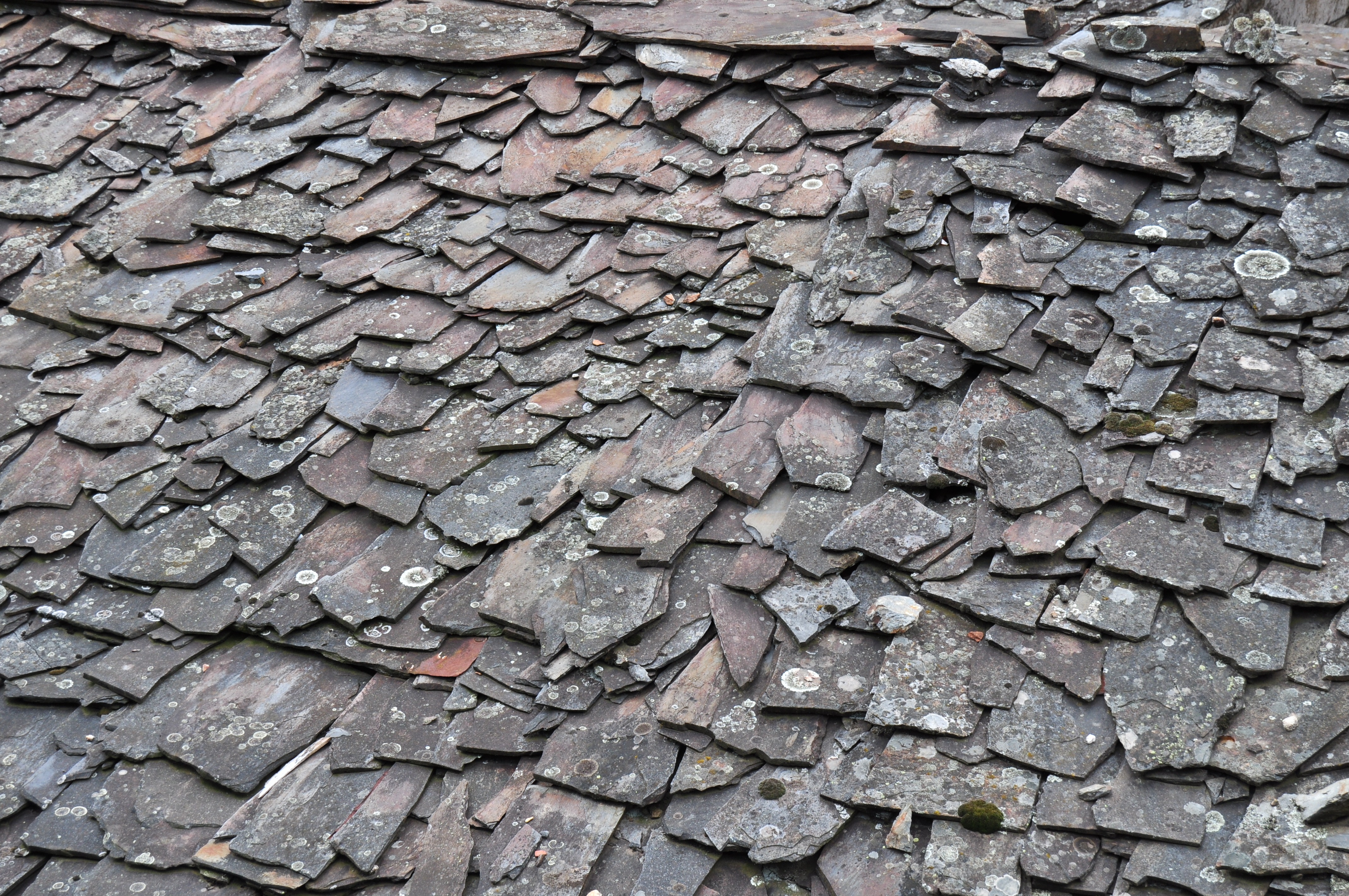 Riomalo de Arriba (Ladrillar) - 016